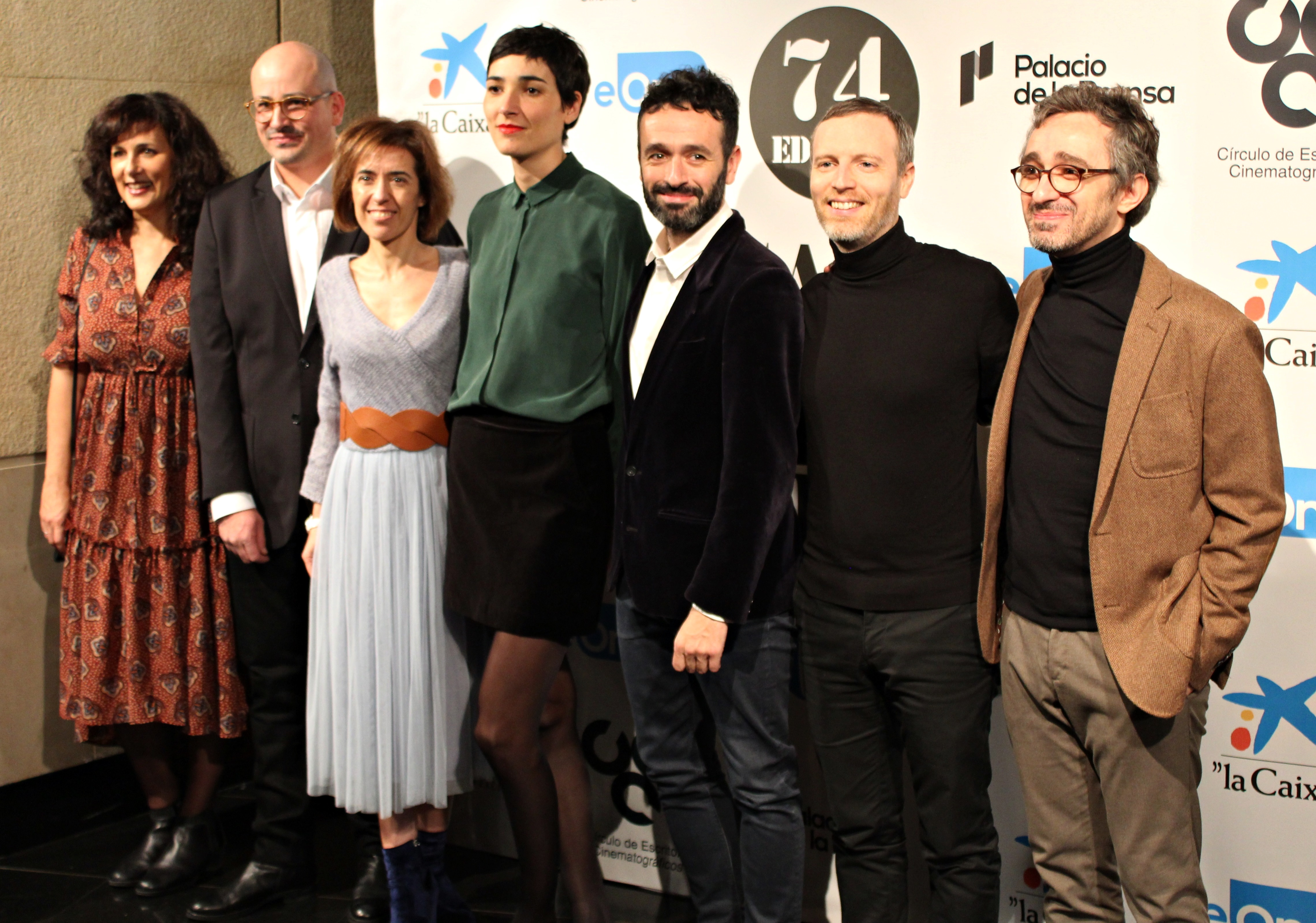 Parte del equipo de la película El reino en la 74 edición de las Medallas del Círculo de Escritores Cinematográficos. De izquierda a derecha: la productora Mariela Besuievsky, el director de fotografía Álex de Pablo, la productora Mercedes Gamero, la guionista Isabel Peña, el director y guionista Rodrigo Sorogoyen, el músico Olivier Arson y el montador Alberto del Campo.